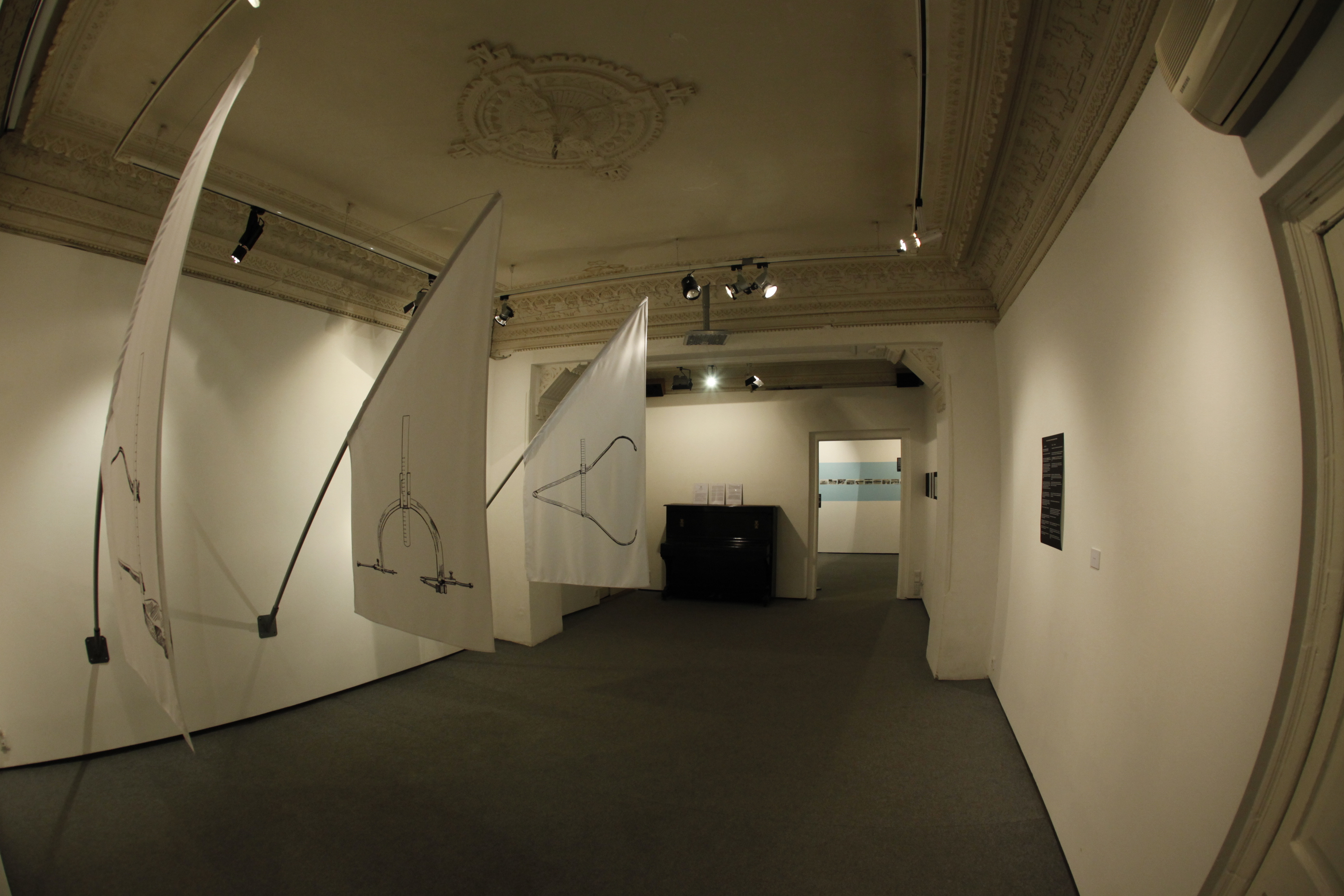 Микита Кадан "Перед стратою", 2013